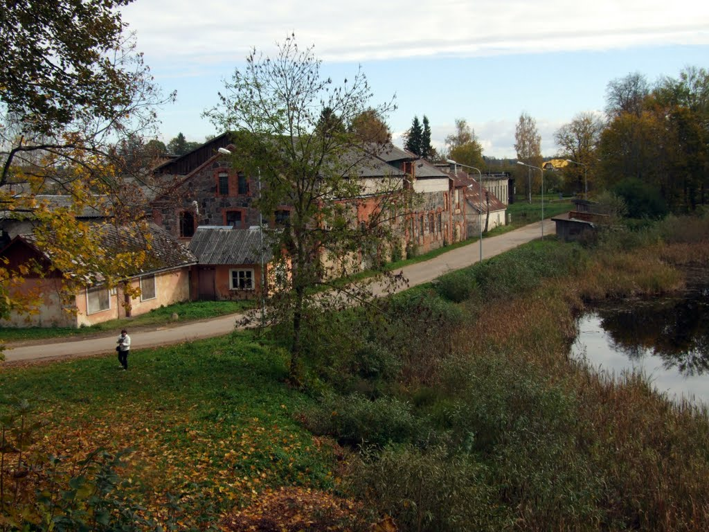 Vidrižu (Widdrisch) muižas ēkas